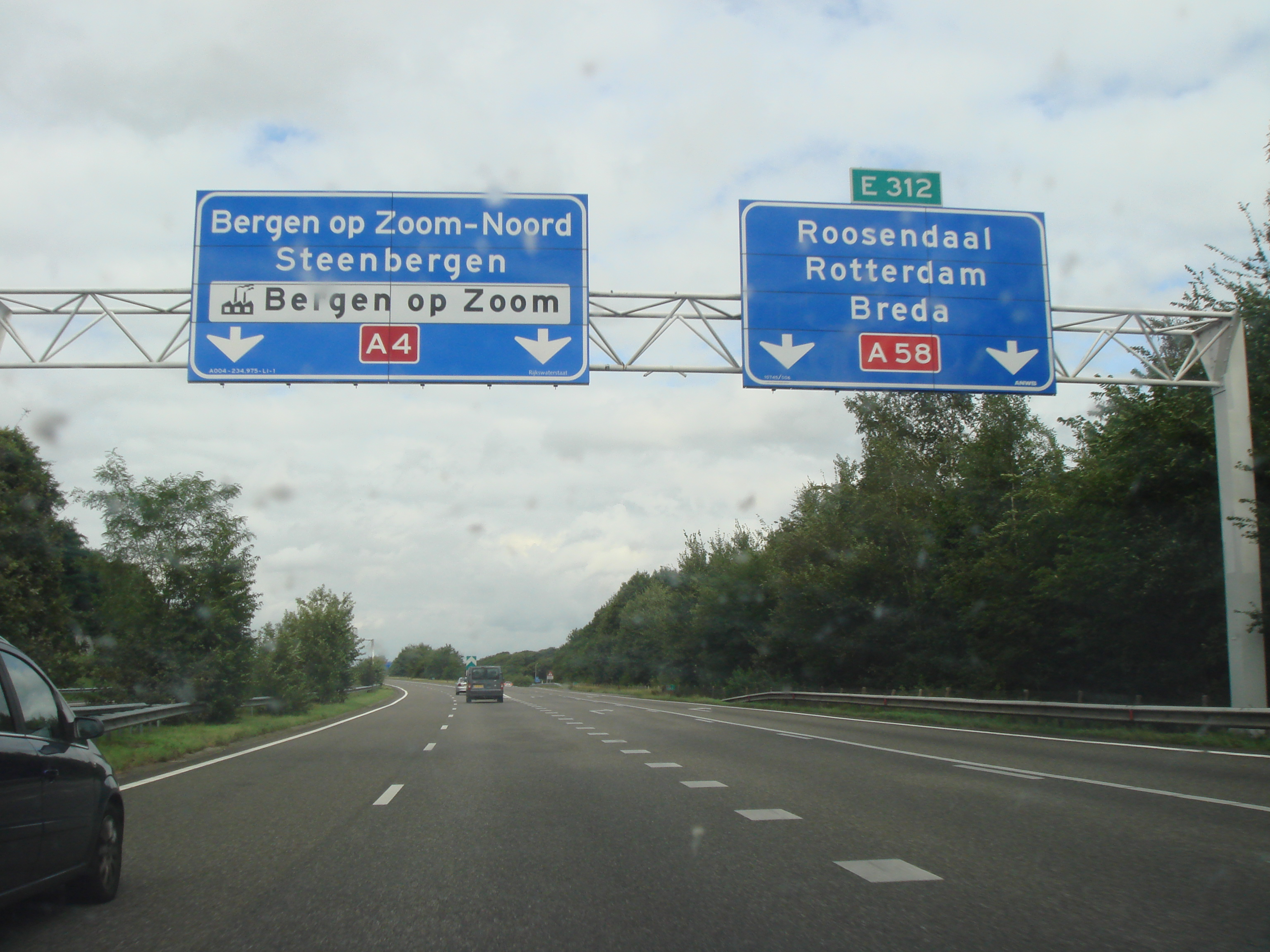 La Route européenne E312 au niveau de Bergen op Zoom aux Pays-Bas